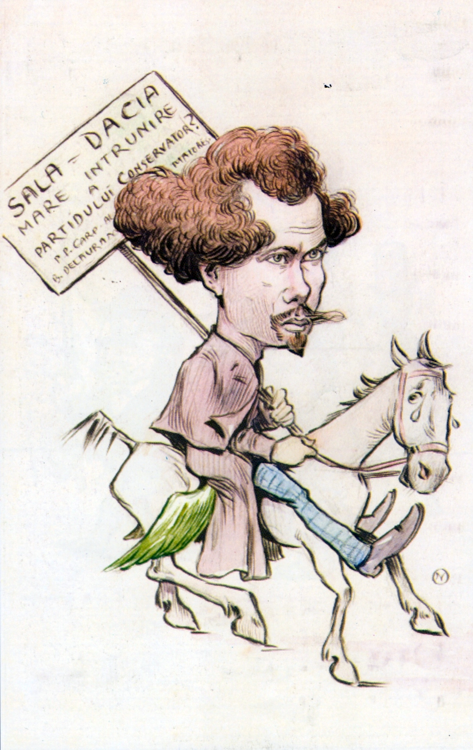 Barbu Ștefănescu Delavrancea - Sala Dacia în Ziarul „Pagini literare”